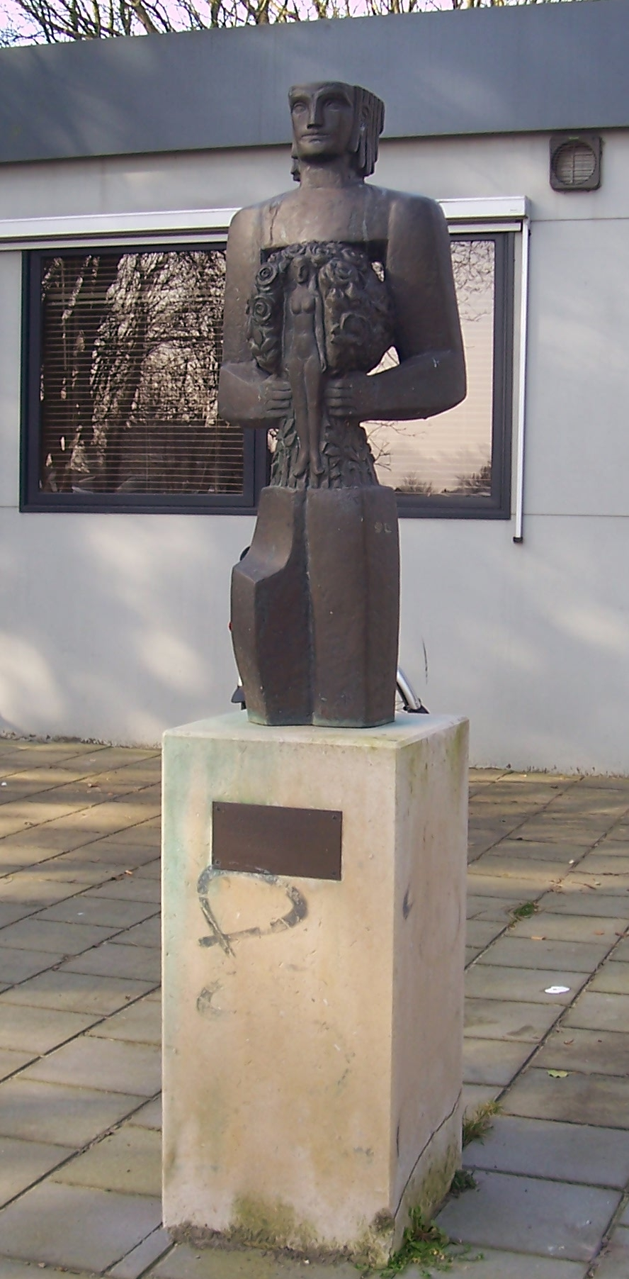 Willem Berkhemer. Hommage aan Gerrit Achterberg, dichter, overleden in 1962. Noordwijk. Van den Bergh-Stichting